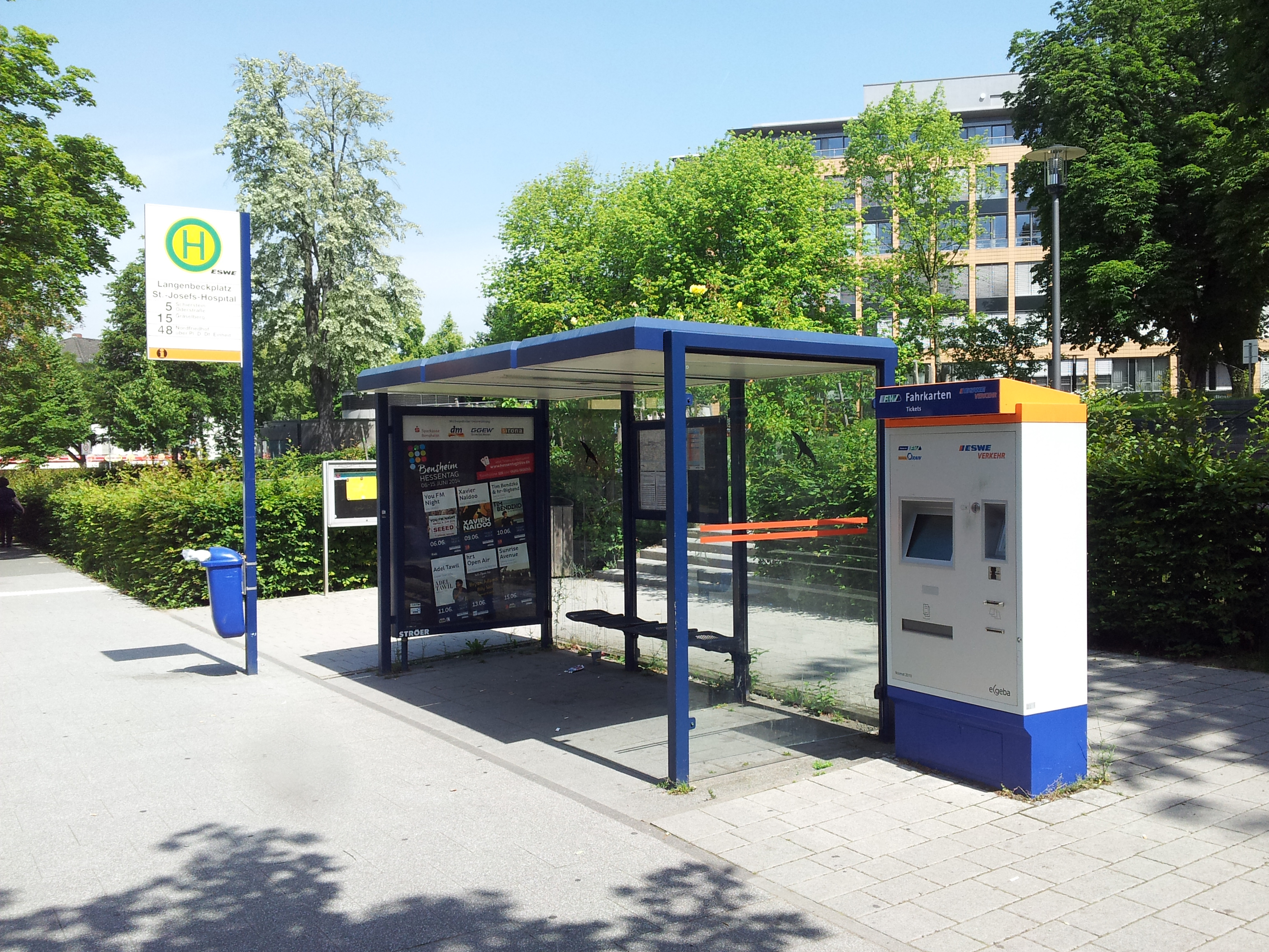 Haltestelle des ÖPNV in Wiesbaden, teilweise Corporate Design Elemente des RMV